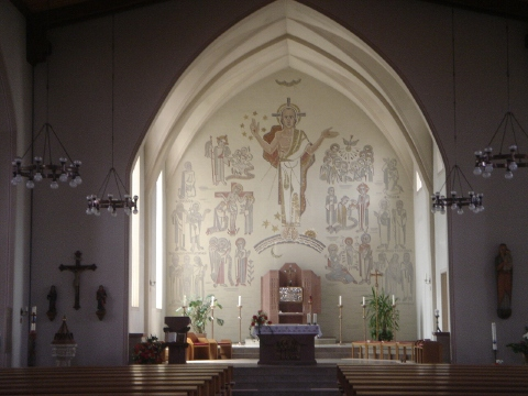 Pfarrkirche Hl. Drei Könige, Chorraum, Garbeck; Altarraumgestaltung von Bernhard Gohla